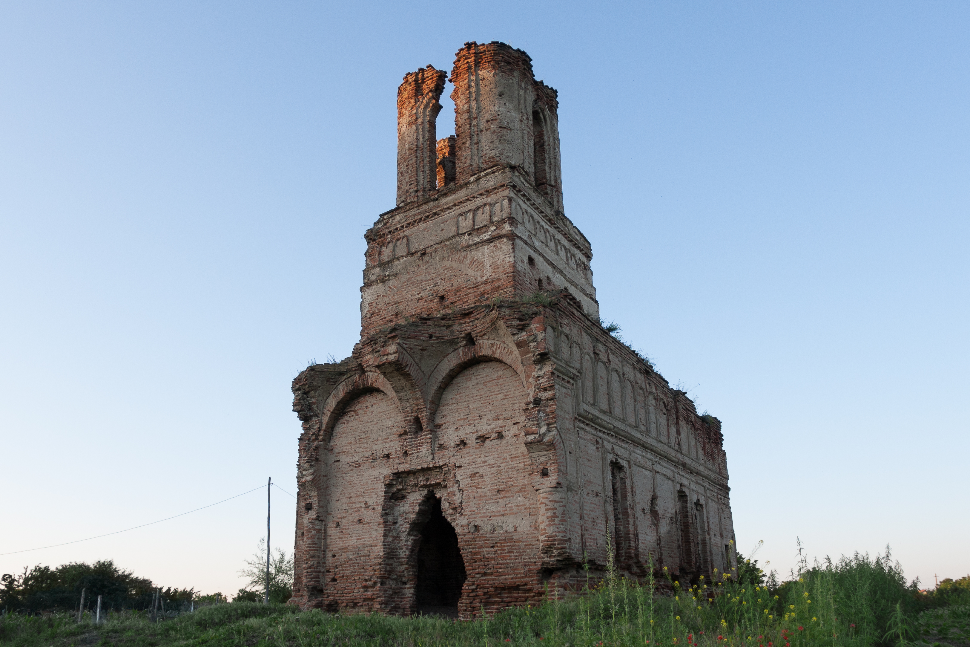 Ruinele Bisericii „Sf. Ioan Damaschin”